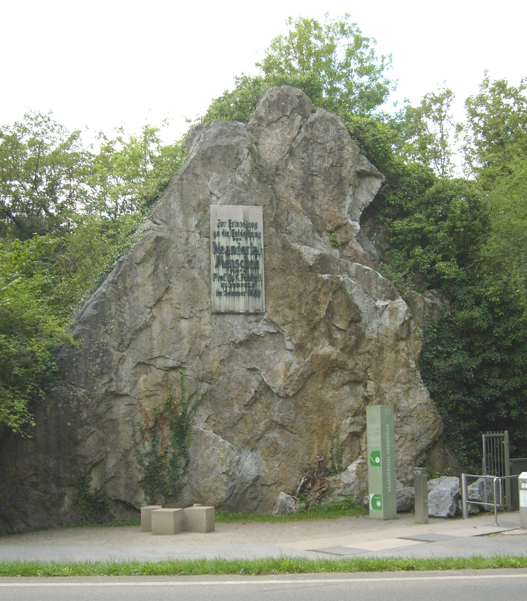 Der Rabenstein im Neandertal (nach Säuberung im Jahr 2007), rechts Zugang zur Fundstelle